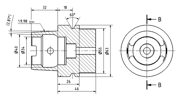 Hohlschaftkegel Typ A nach DIN 69893 - HSK - A63, Technische Zeichnung